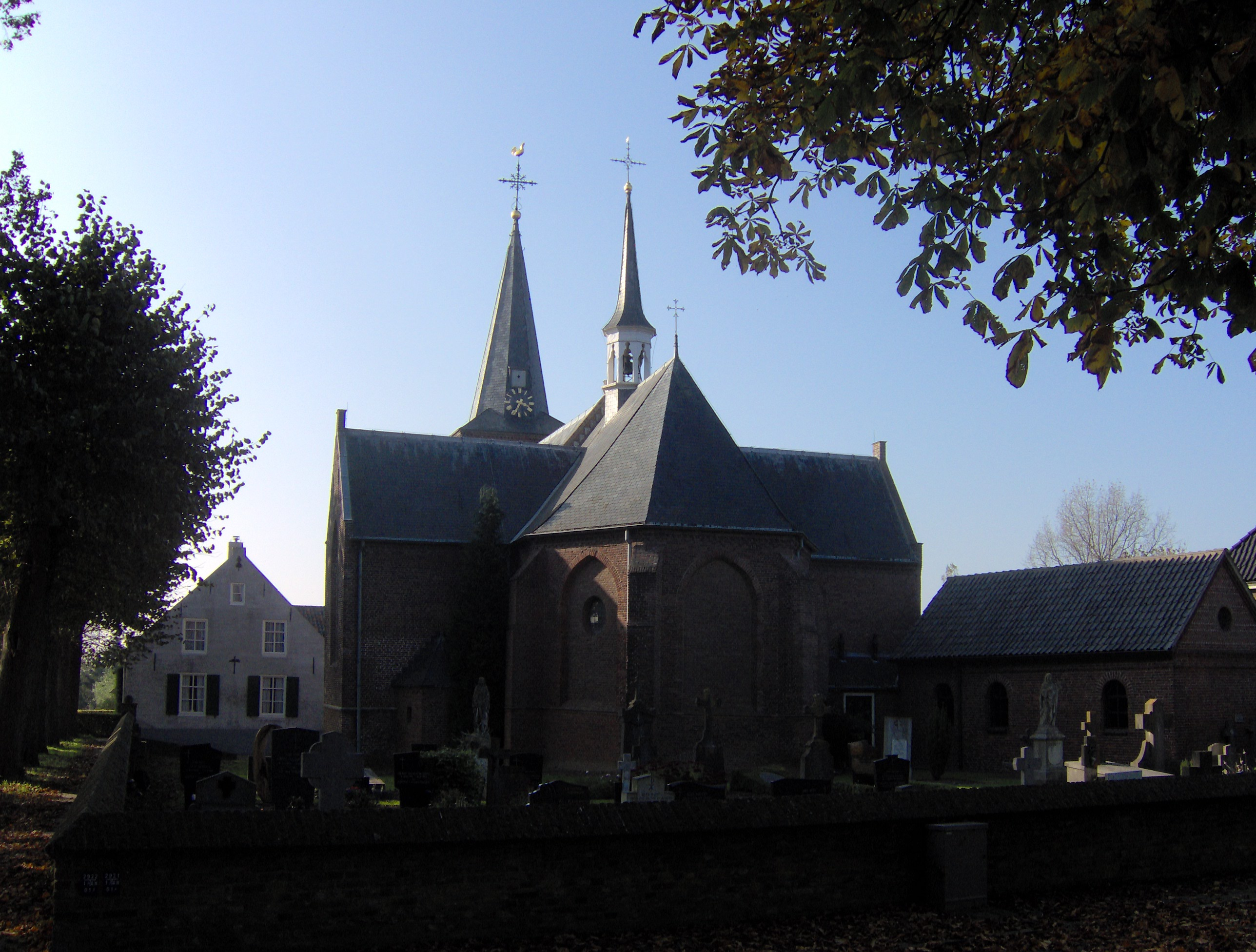 Kerk Bokhoven. eigen foto Licensing categorie:afbeelding 's-Hertogenbosch